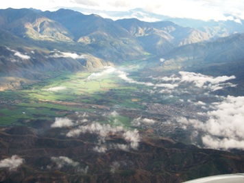 foto aerea catamayo